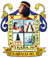 Stemma di Ixtlahuacán del Río, Jalisco